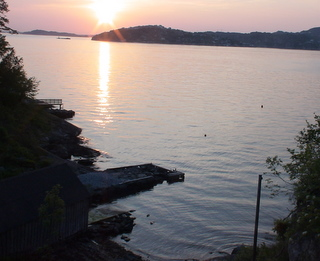 Natur bilde med utsikt fra Breivikstølen